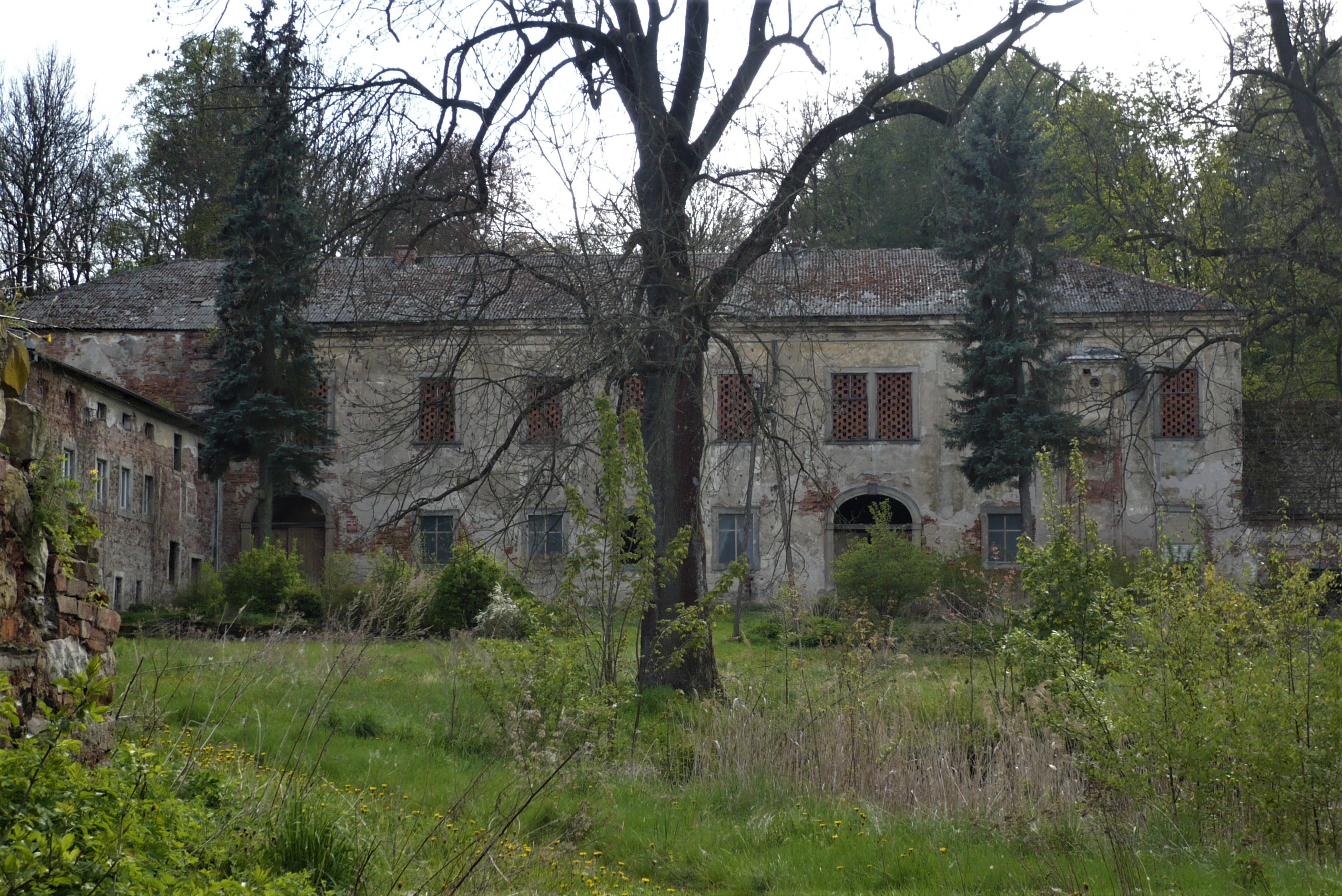 Pałac w Korytowie